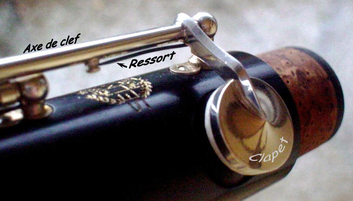 Cliché personnel commenté sous word